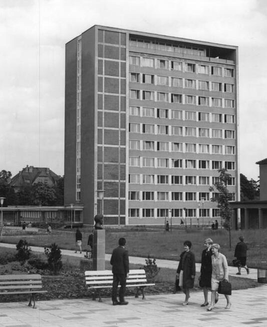 Erfurt, Pädagogisches Institut, Studentenwohnheim Zentralbild Demme 9.6.67 Volkswahlen 1967: Erfurt: Wohnhochhaus des Pädagogischen Instituts Die Studenten des Pädagogischen Institut "Dr. Theodor Neubauer" in Erfurt nennen seit November 1963 dieses Wohnhochhaus ihr eigen. Dieses Studentenwohnheim verfügt über 278 Betten. Das Pädagogische Institut besitzt vier weitere Wohnheime. 1 513 Studenten erwerben sich im Direktstudium und 960 im Fernstudium pädagogische Kenntnisse für den Lehrerberuf.